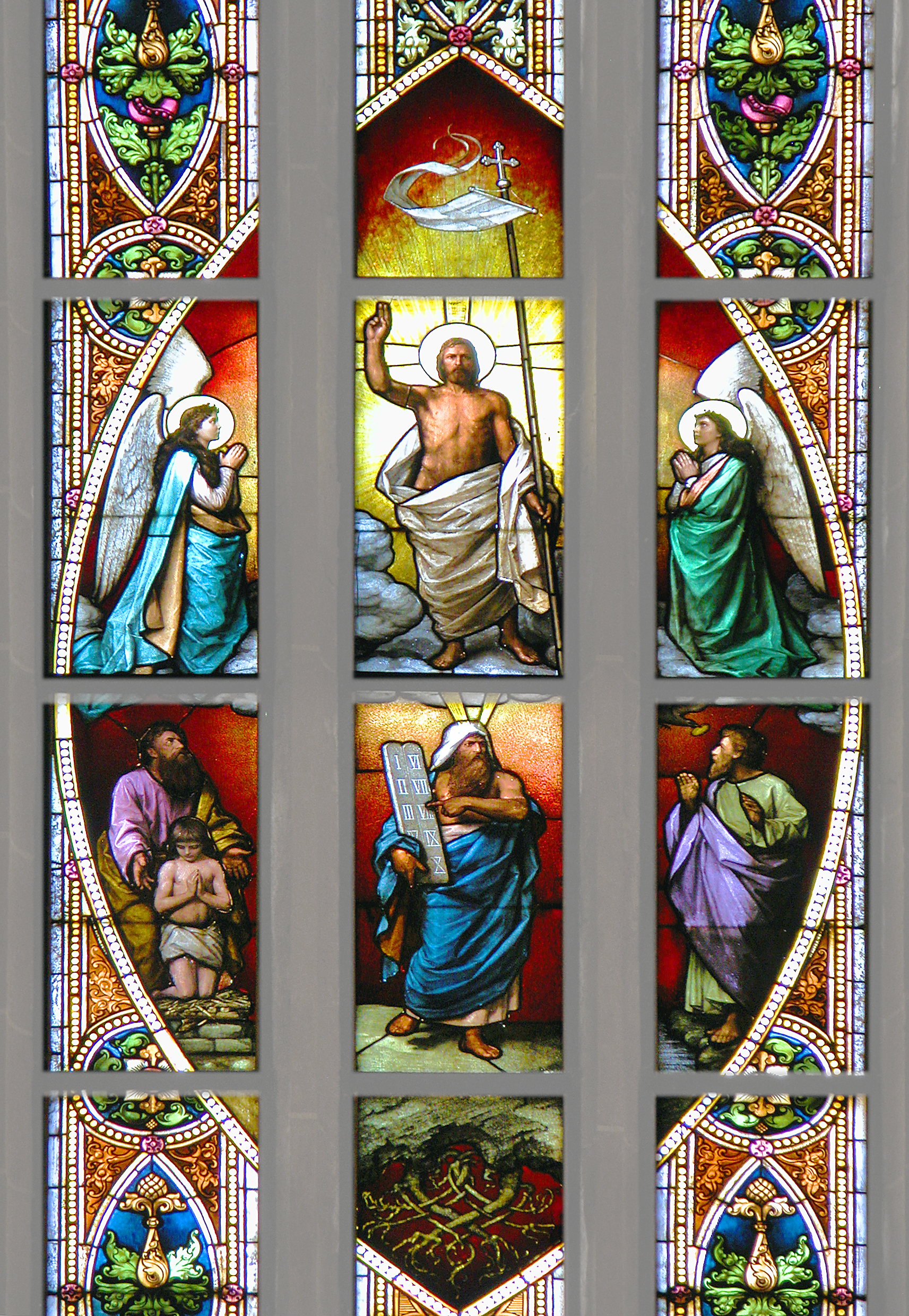 18.04.2011 04774 Dahlen (Sachsen), Kirchstraße (GMP: 51.364957,13.000966): Stadtkirche Unserer Lieben Frauen. Altar mit spätgotischen Schnitzfiguren um 1520 vom Meister des Döbelner Hochaltars,im Altarschrein von 1863 aufgestellt. Die Bleiverglasung der Chorfenster fertigte die Dresdner Glasma- lereiwerkstatt Anemüllers Nachfahren 1895 an. [DSCNn2348.TIF]20110418535DR.JPG(c)Blobelt